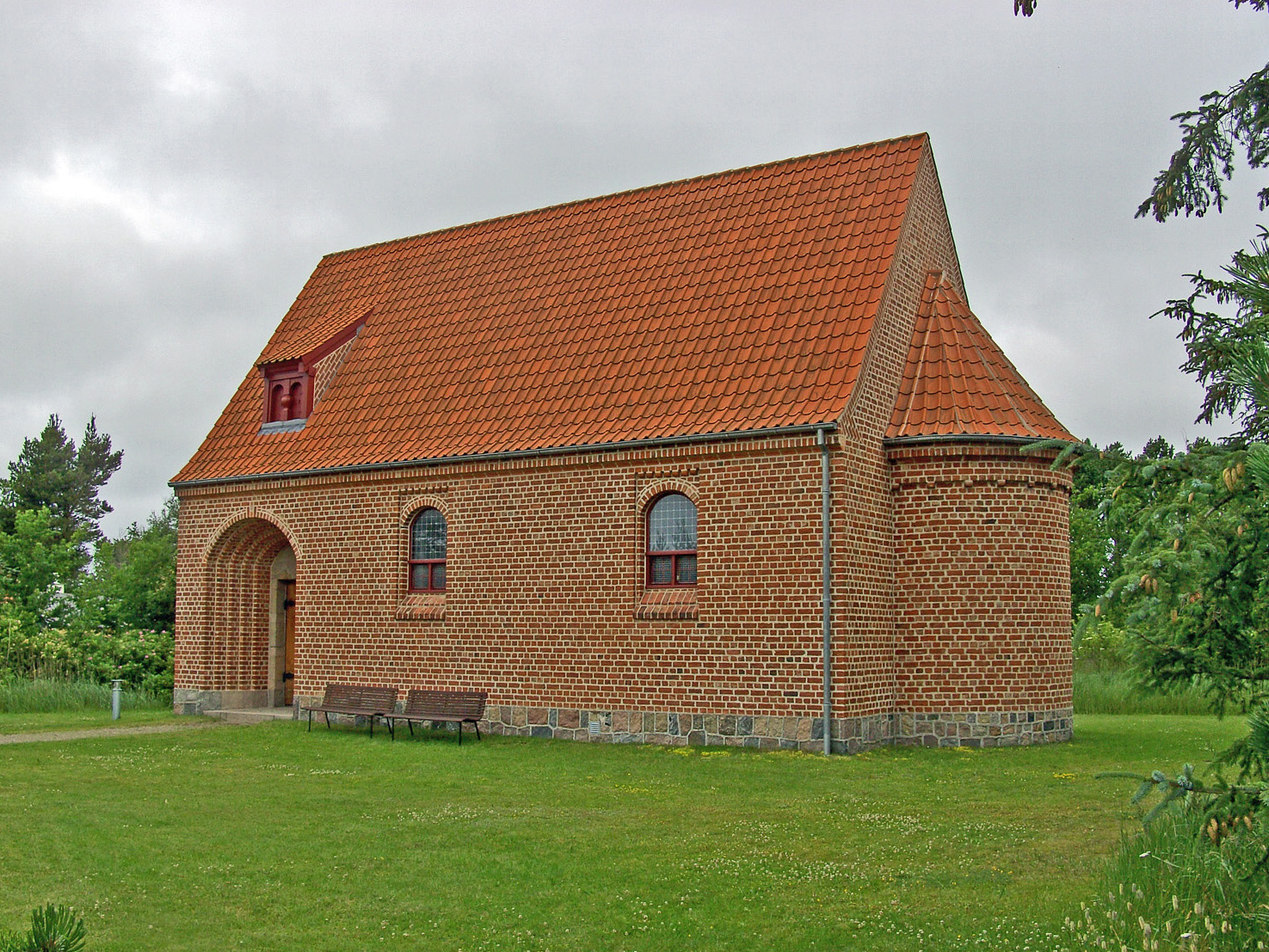 fra sydøst